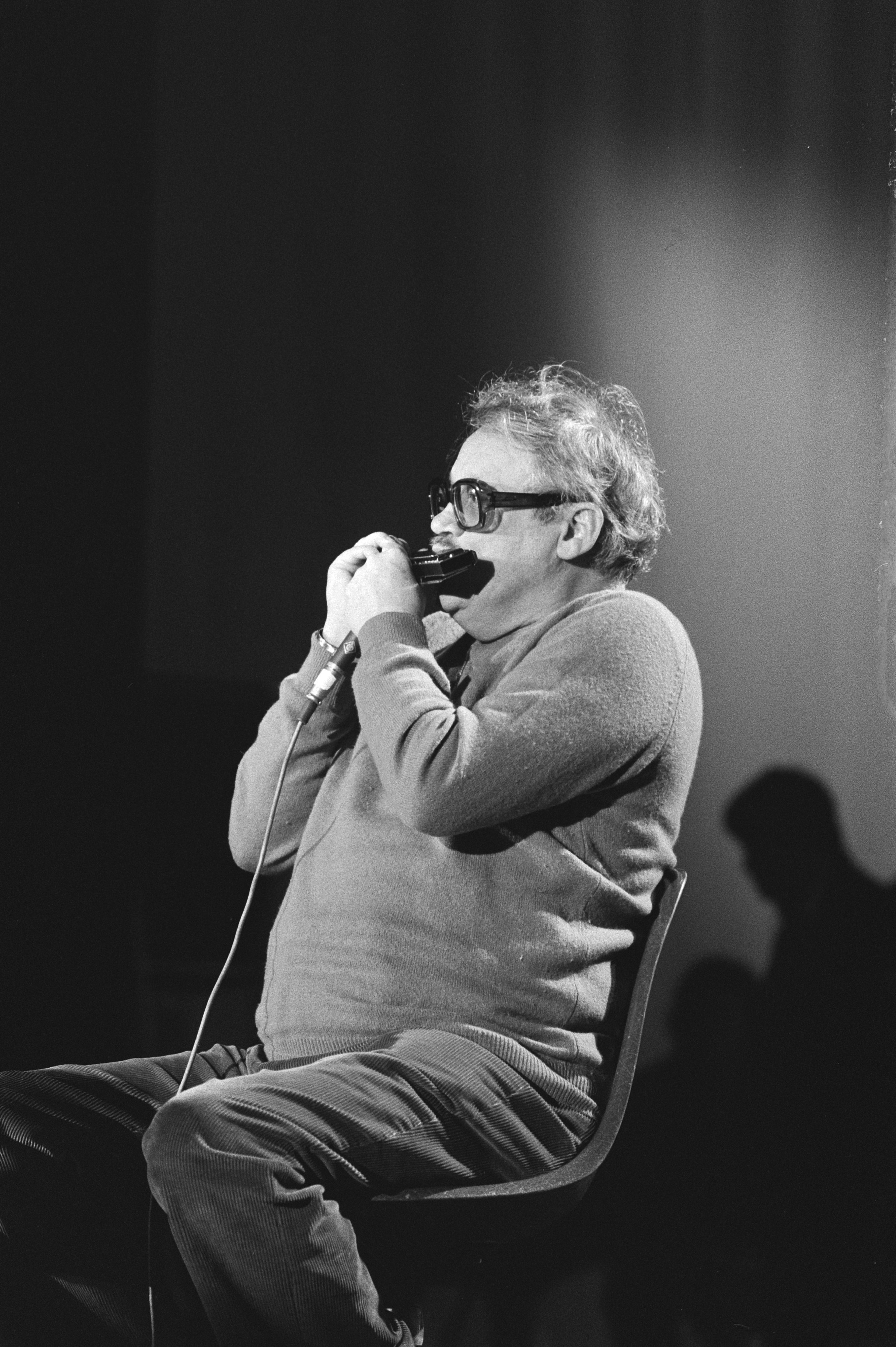 Toots Thielemans, 6 februari 1979